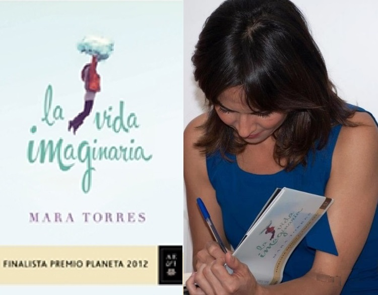 Foto hecha a Mara Torres en la firma de libros junto a la portada de su última novela "La Vida Imaginaria"